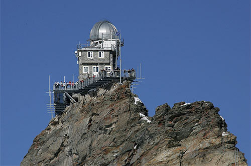 Jungfraujoch: Wetterstation Sphinx